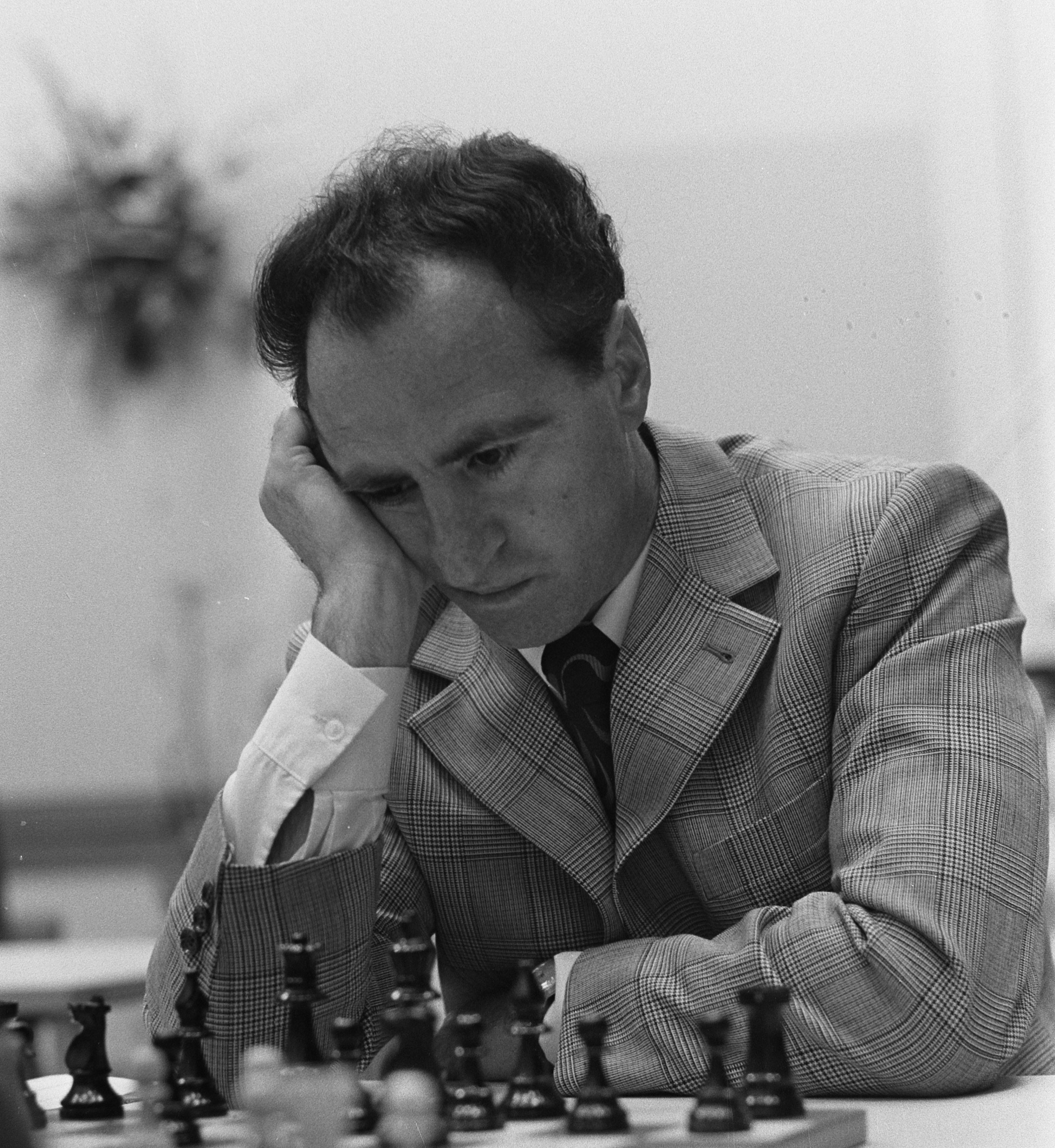 Lev Polugaevsky